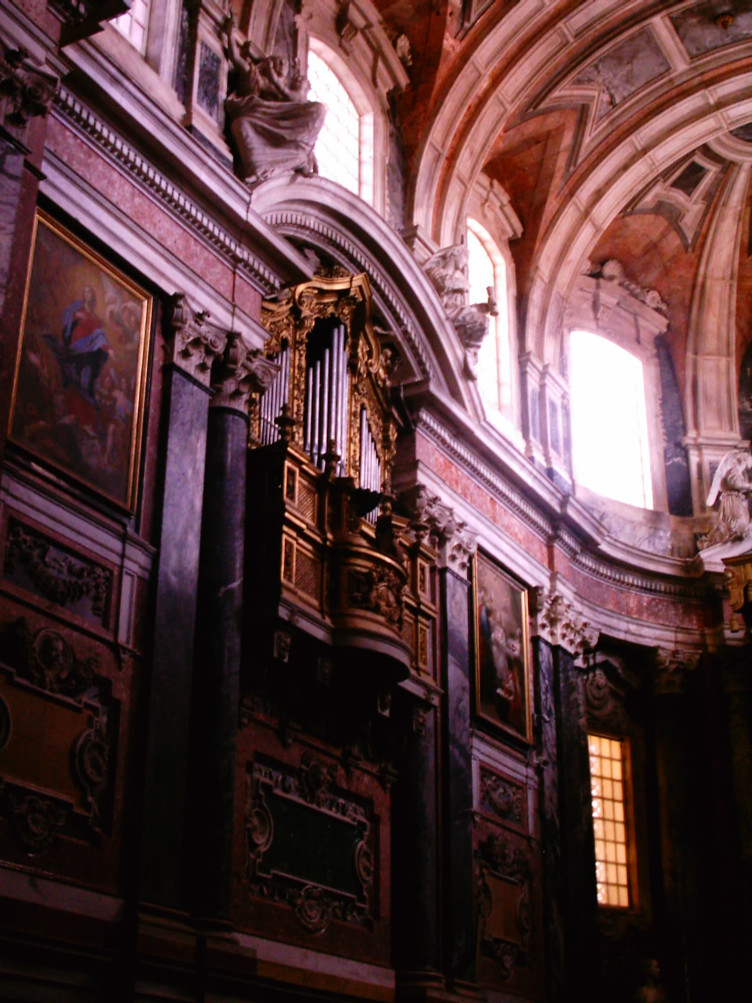 Vista do interior da Sé Catedral de Évora, Évora, Portugal.